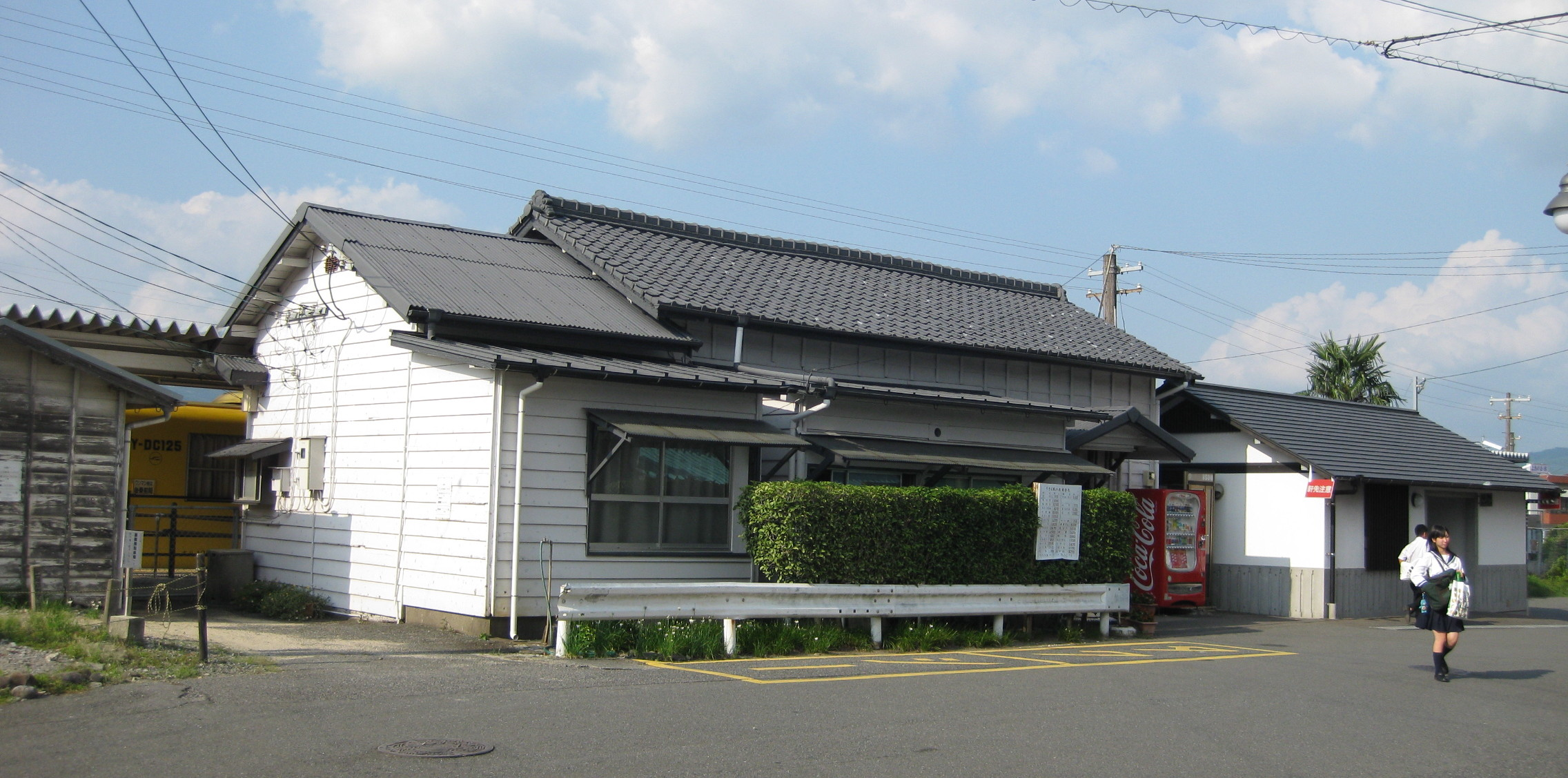 JR九州久大本線うきは駅の画像。